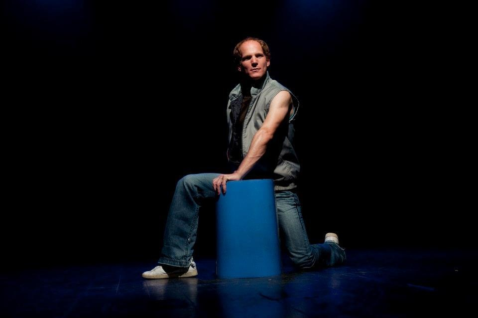 רותם קינן בהופעה